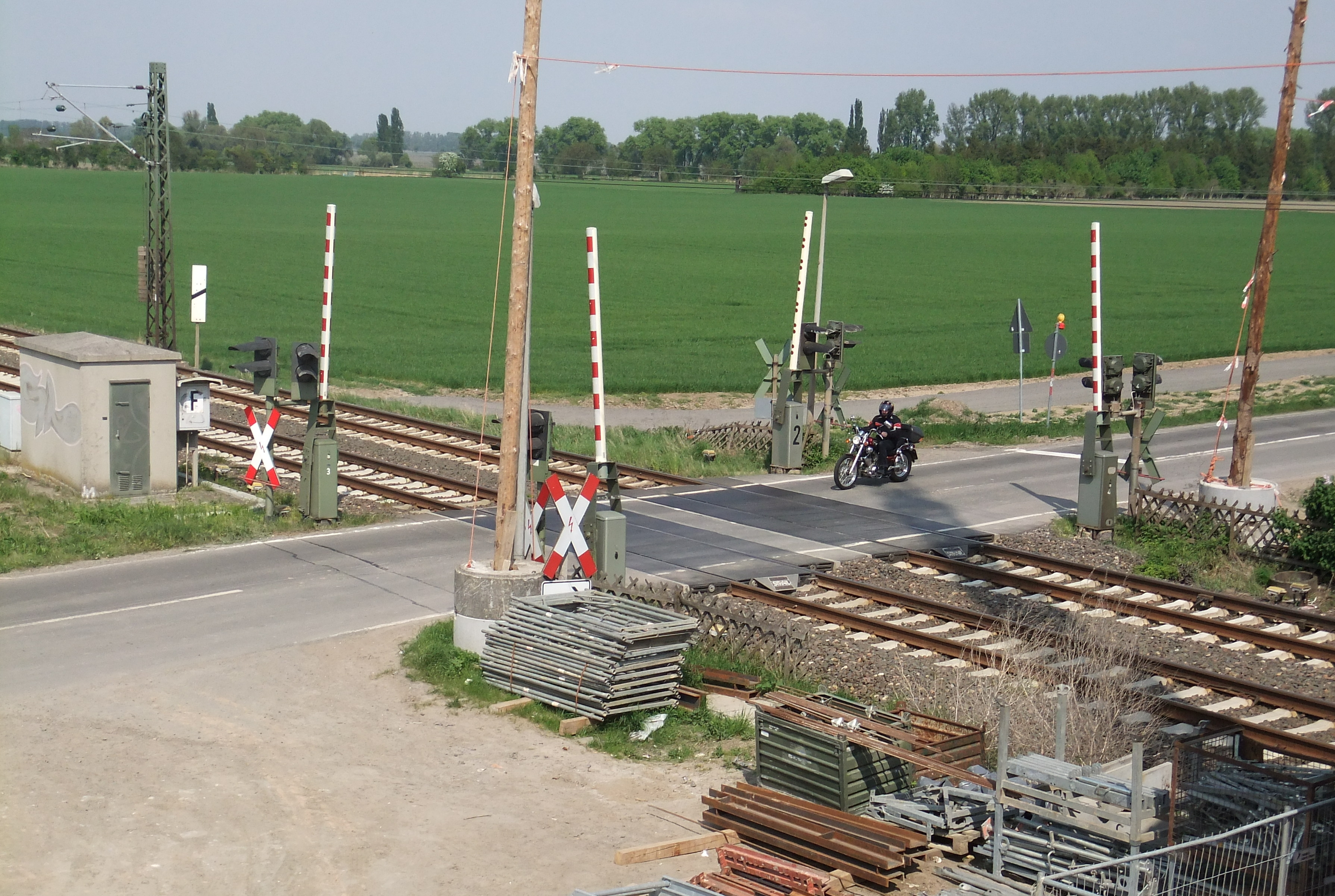 Die höhengleiche Kreuzung der Landesstraße 409 mit der Bahnstrecke Mainz–Mannheim in Form eines Bahnübergangs mit Vollschranken mit Einfahr- und Ausfahrschranken in der Gemarkung von Bechtheim (Blickrichtung Ost)